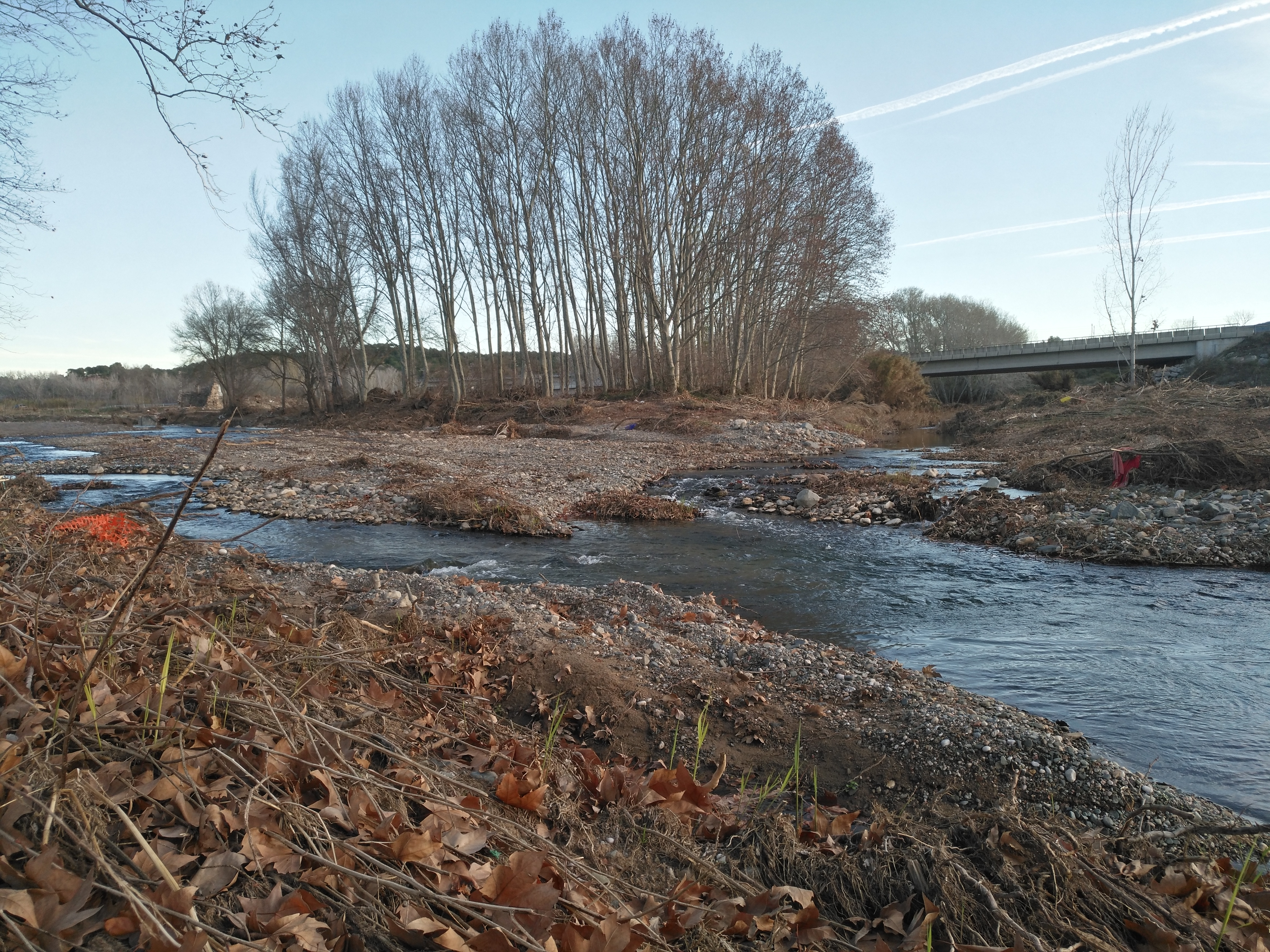 El riu Francolí just quan rep l'afluent del riu Anguera a Montblanc. Al fons -i d'esquerra a dreta- es veu l'unica paret que queda en peu del molí del Malet, l'albareda al centre i el pont de la carreterra. Foto de desembre de 2019.